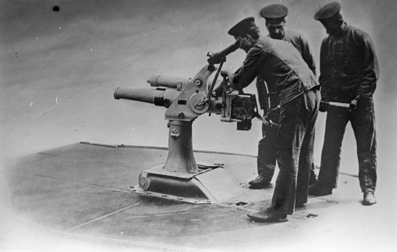 Versenkbares 7,5cm-U-Boot-Geschütz Versenkbares 7,5 cm/L 18 Geschütz der Firma Krupp für Unterseeboote (Uboote)